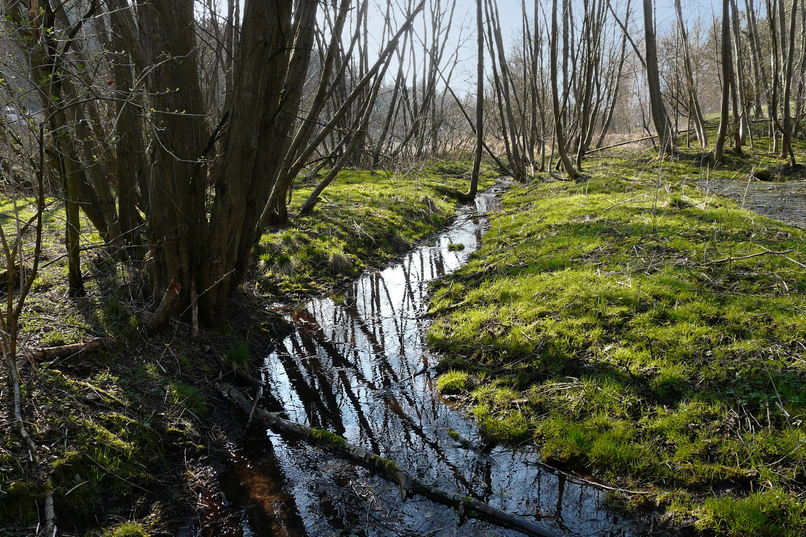 Krupský potok před Krupským rybníkem